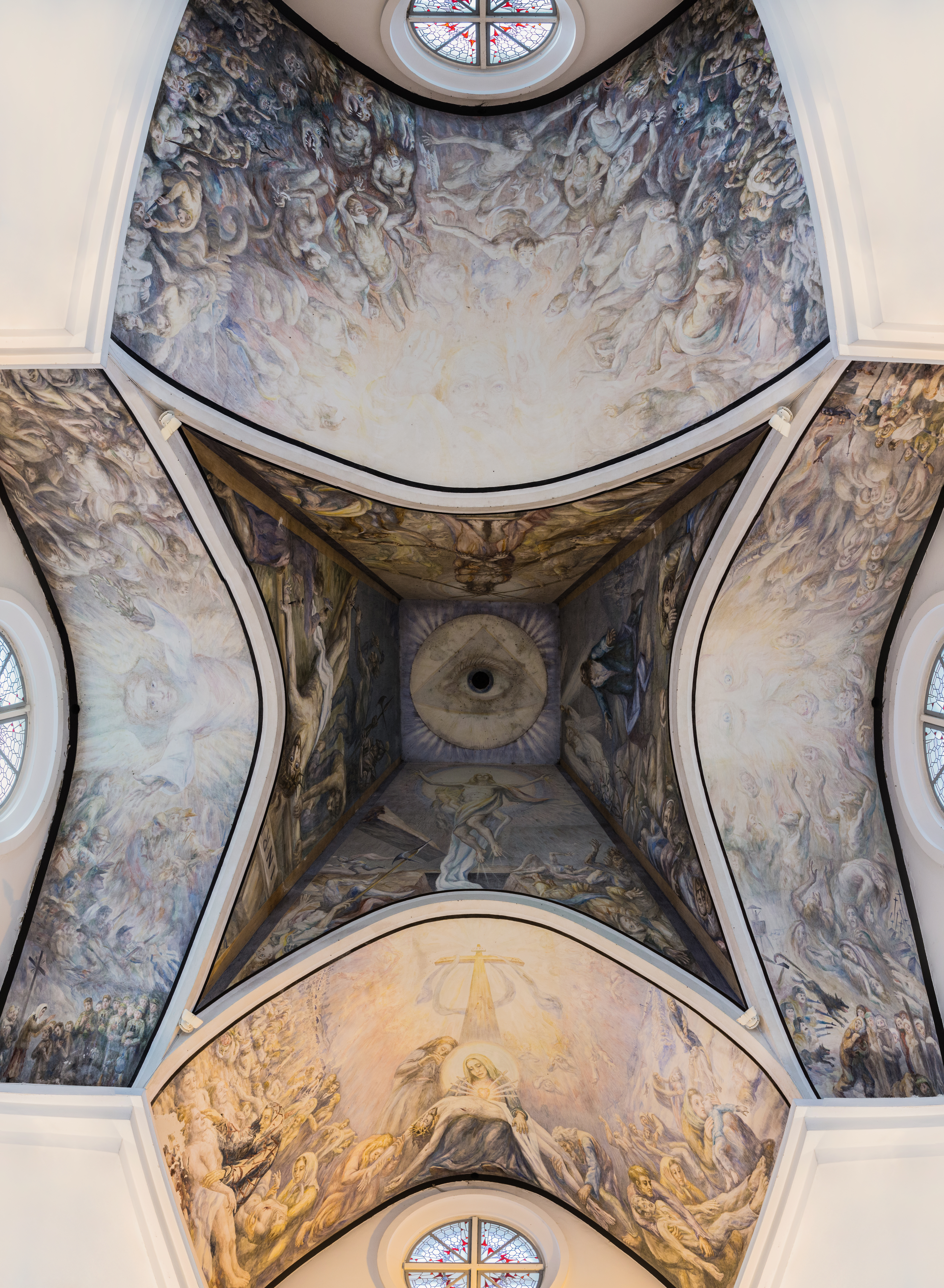 Rainių koplyčios freskos (autorius A. Kmieliauskas)